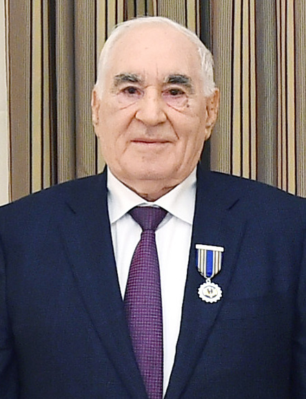 Fəttah Heydərov